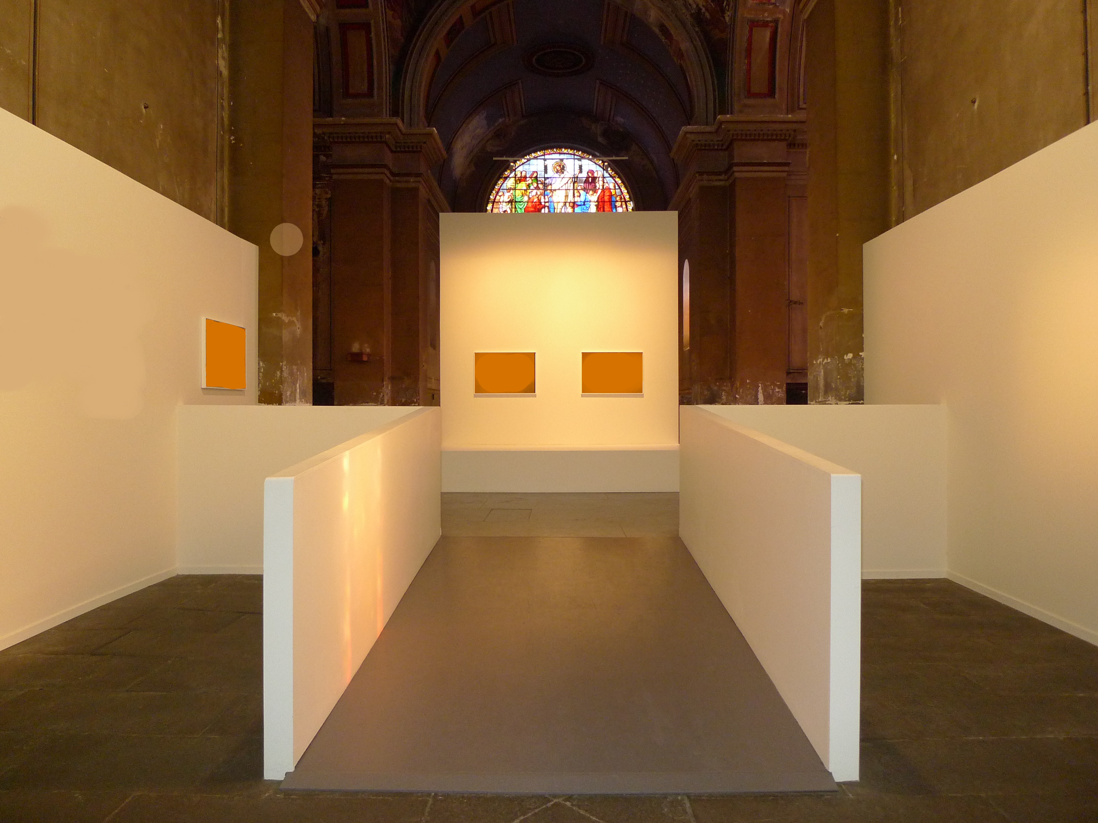 Expsoition voir la ville dans la chapelle de l'ancien hôpital général de clermont-ferrand